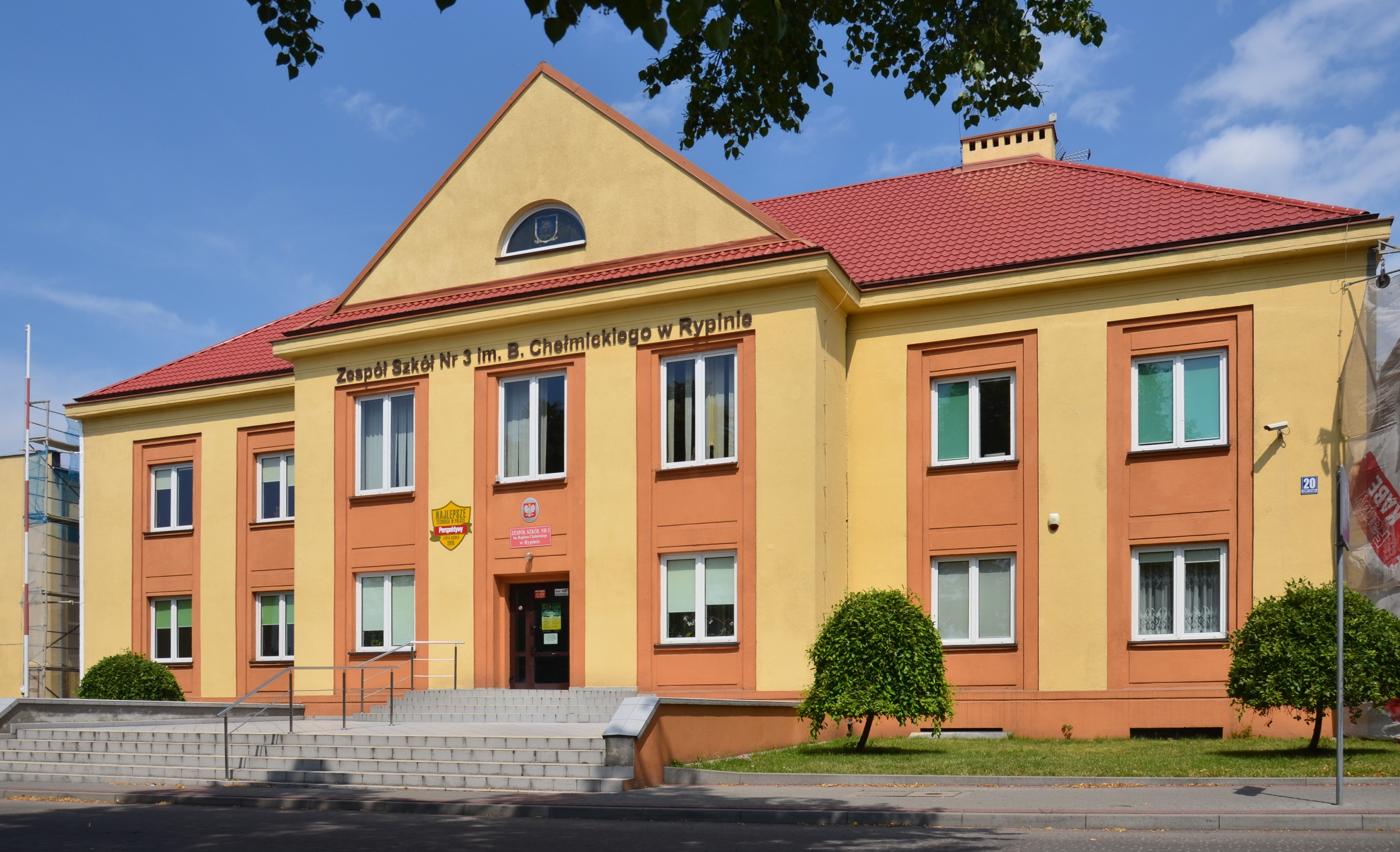 Zespół Szkół nr 3 im. Bogdana Chełmickiego